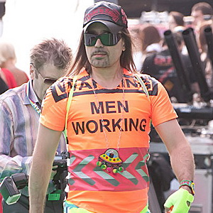 На церемонии вручения премии МУЗ ТВ 2011 3 июня 2011 года